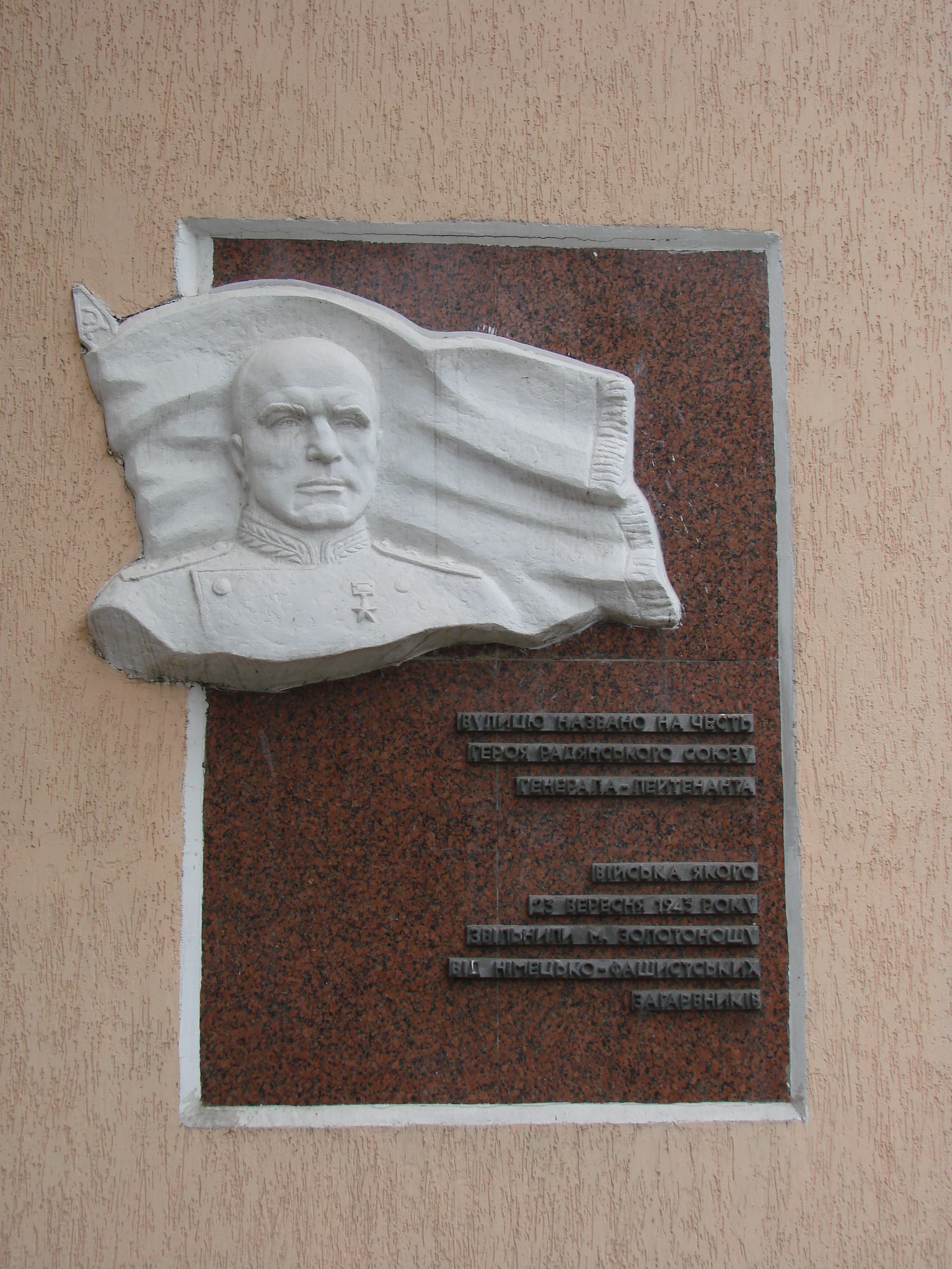 Барель`єф генерала В. Обухова, Золотоноша, міськрайонний центр зайнятості населення по вул. Обухова